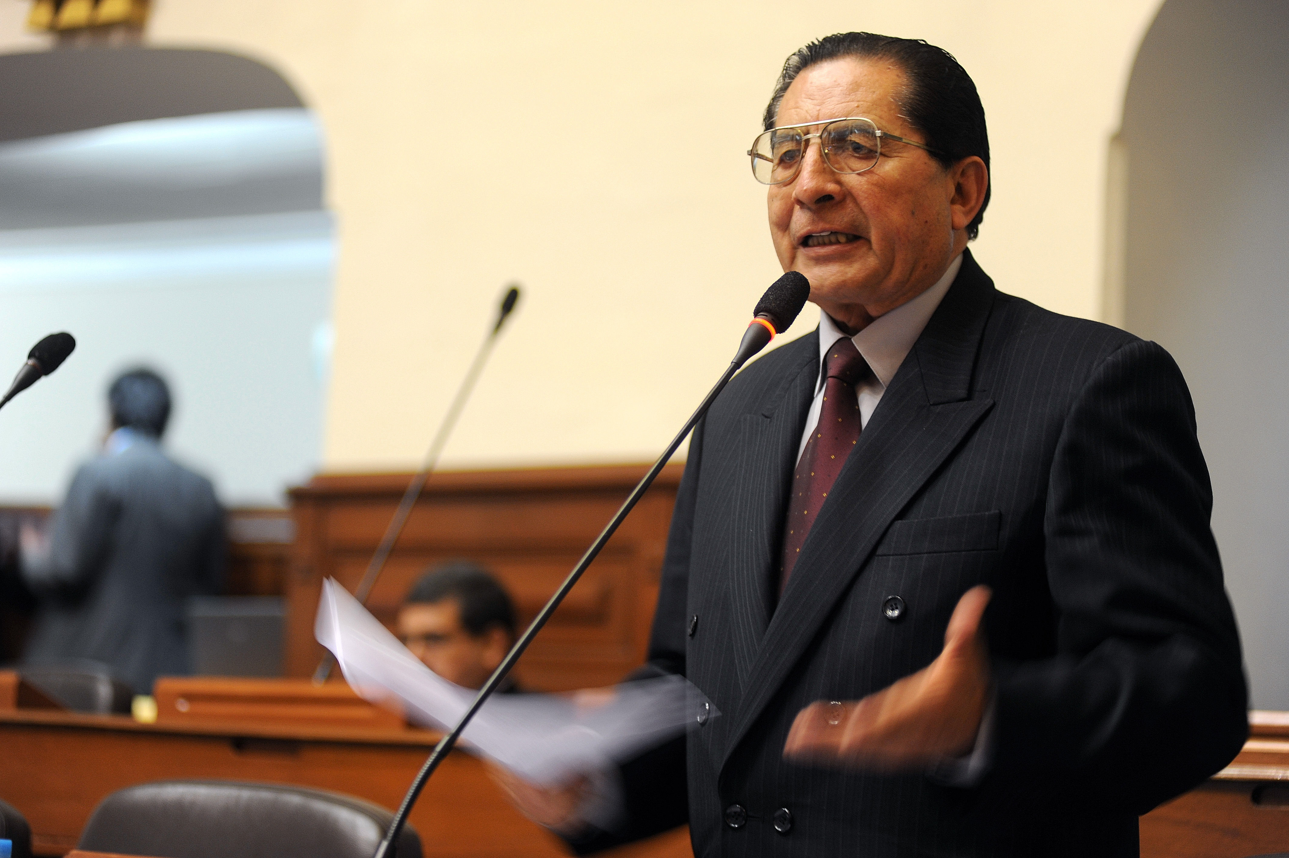 El congresista Aldo Estrada Choque fija su posición en el debate parlamentario realizado esta tarde por el Pleno.